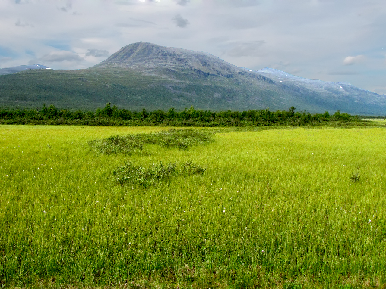 Landscape near Kebnekaise